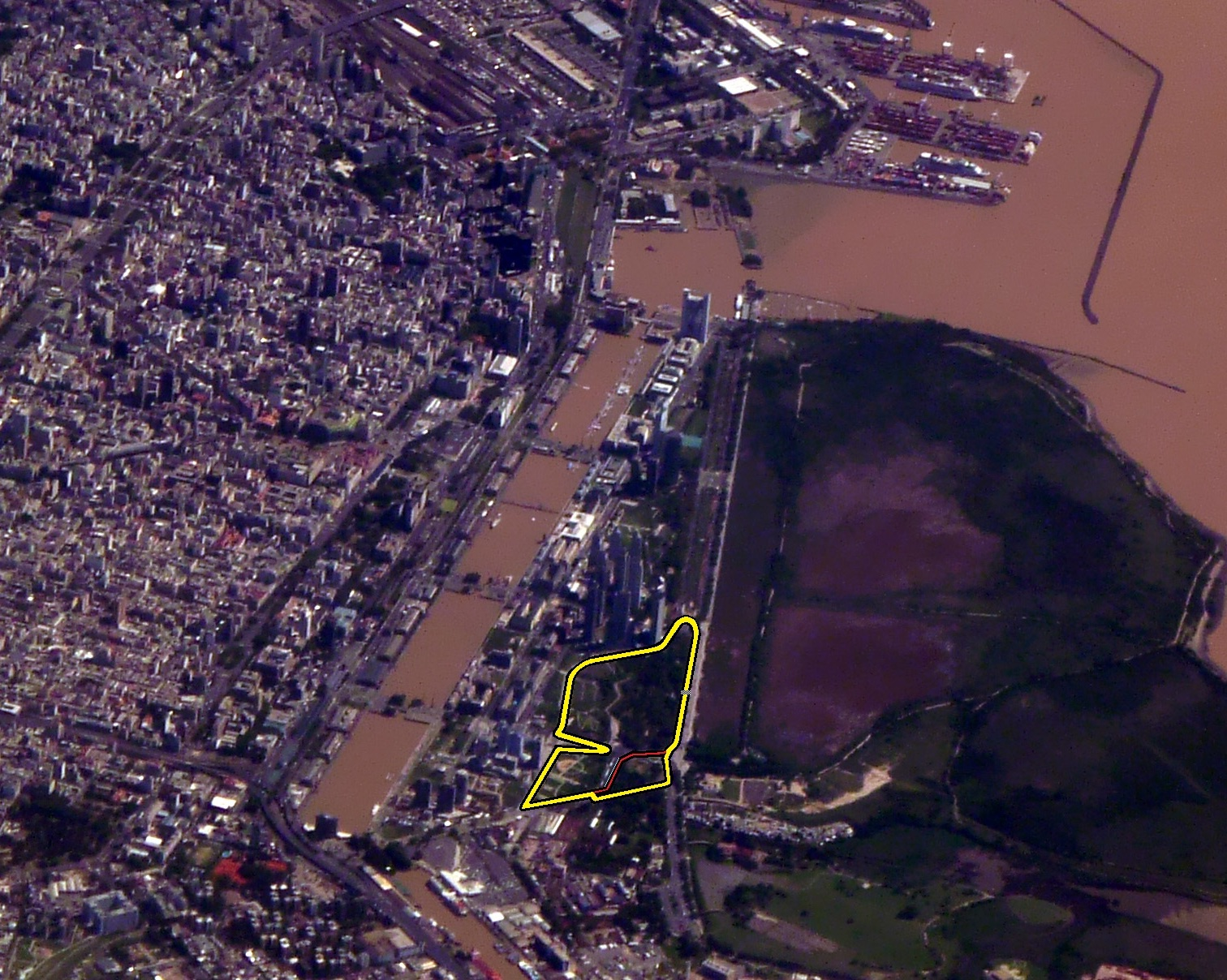 Diagrama de circuito callejero de Buenos Aires en Puerto Madero, donde compitió la Formula E en el ePrix del 2015, dibujado sobre una foto aérea de Buenos Aires